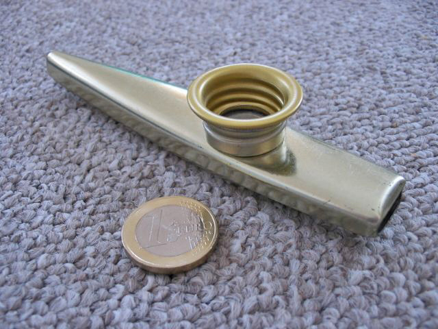 Mirliton.